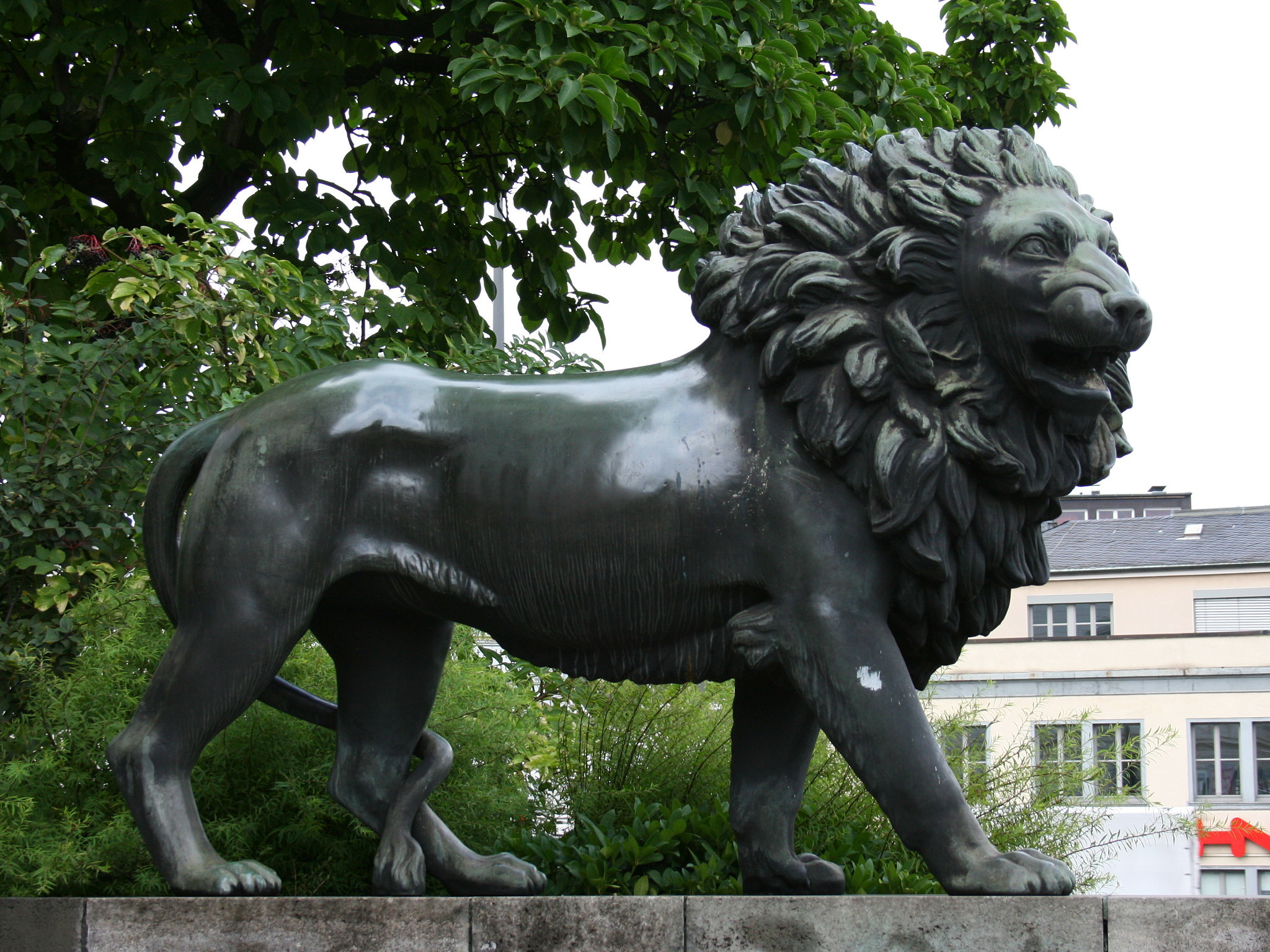 Löwenstatuen vor der ehemaligen Bundesbahndirektion in Wuppertal